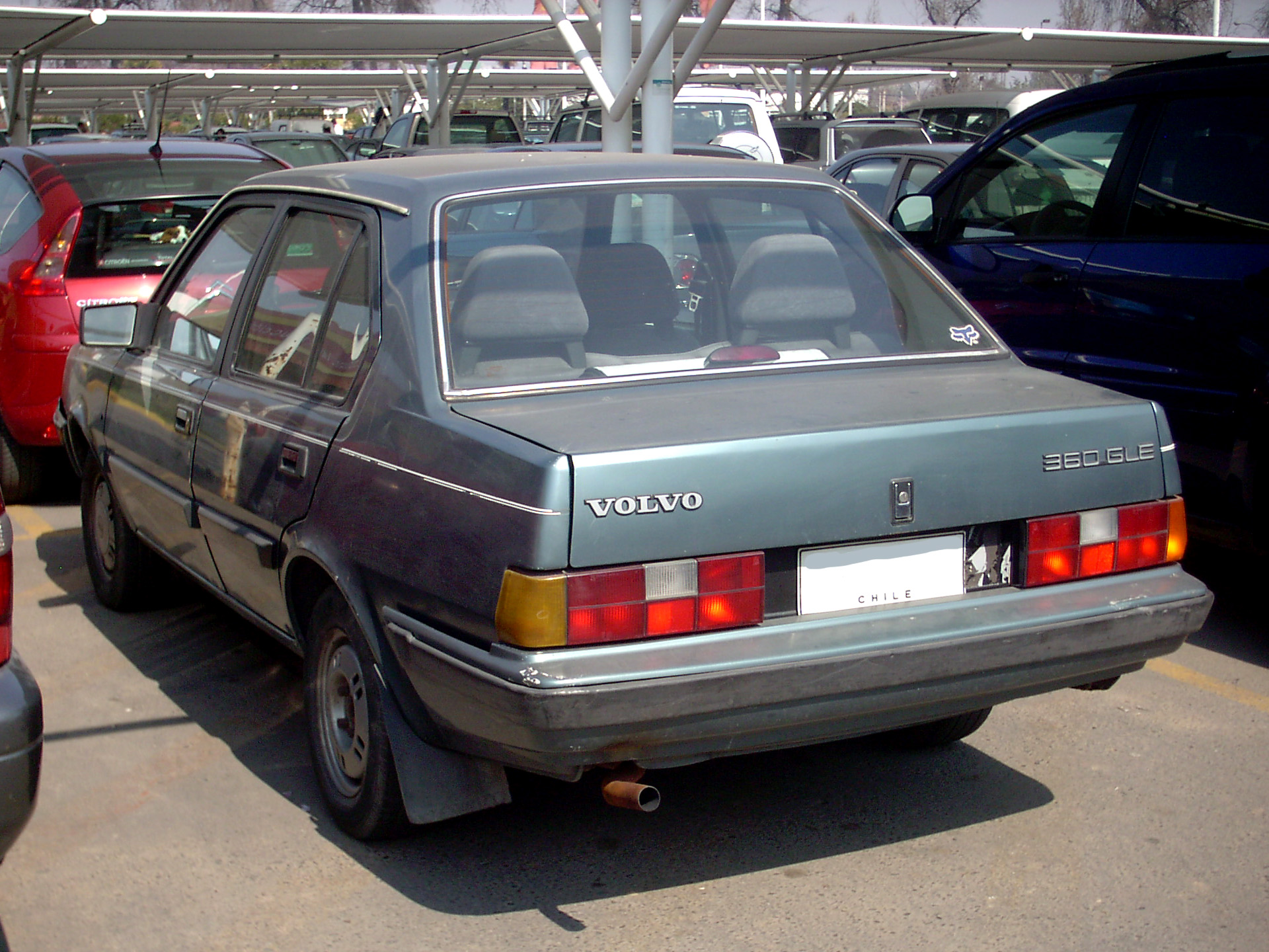 Volvo 360 GLE Sedan 1986